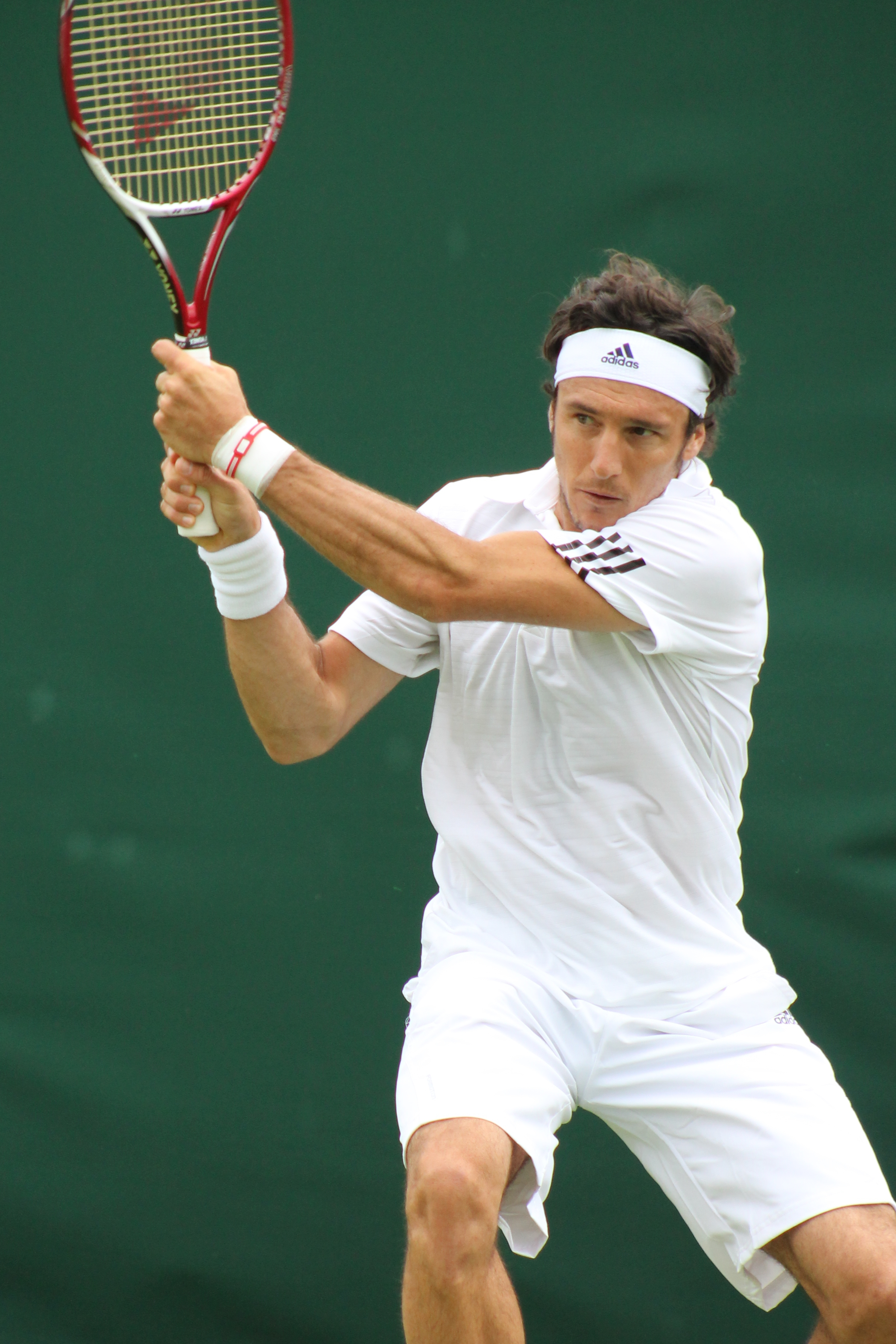 Monaco WM13-026